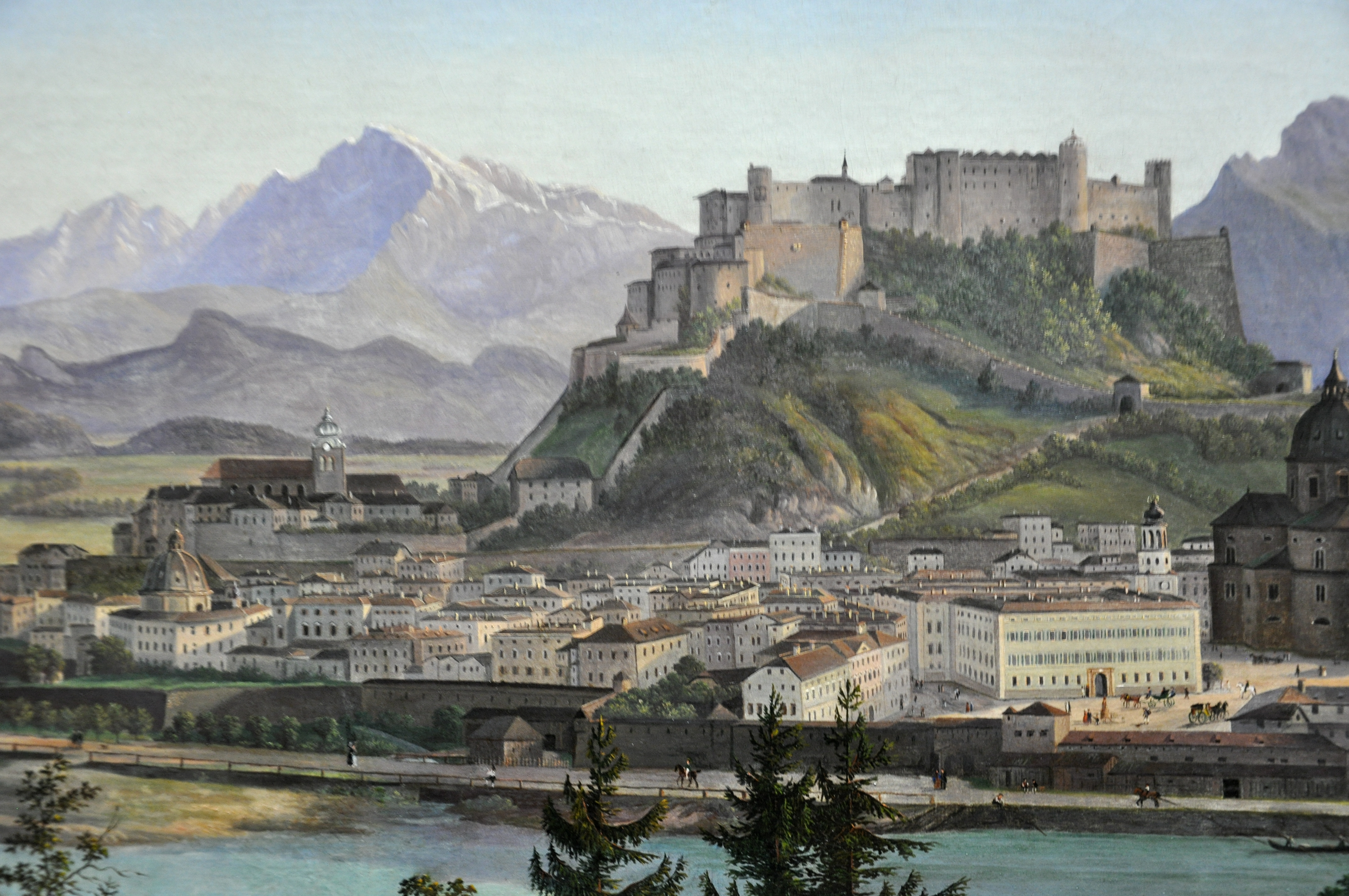 detail